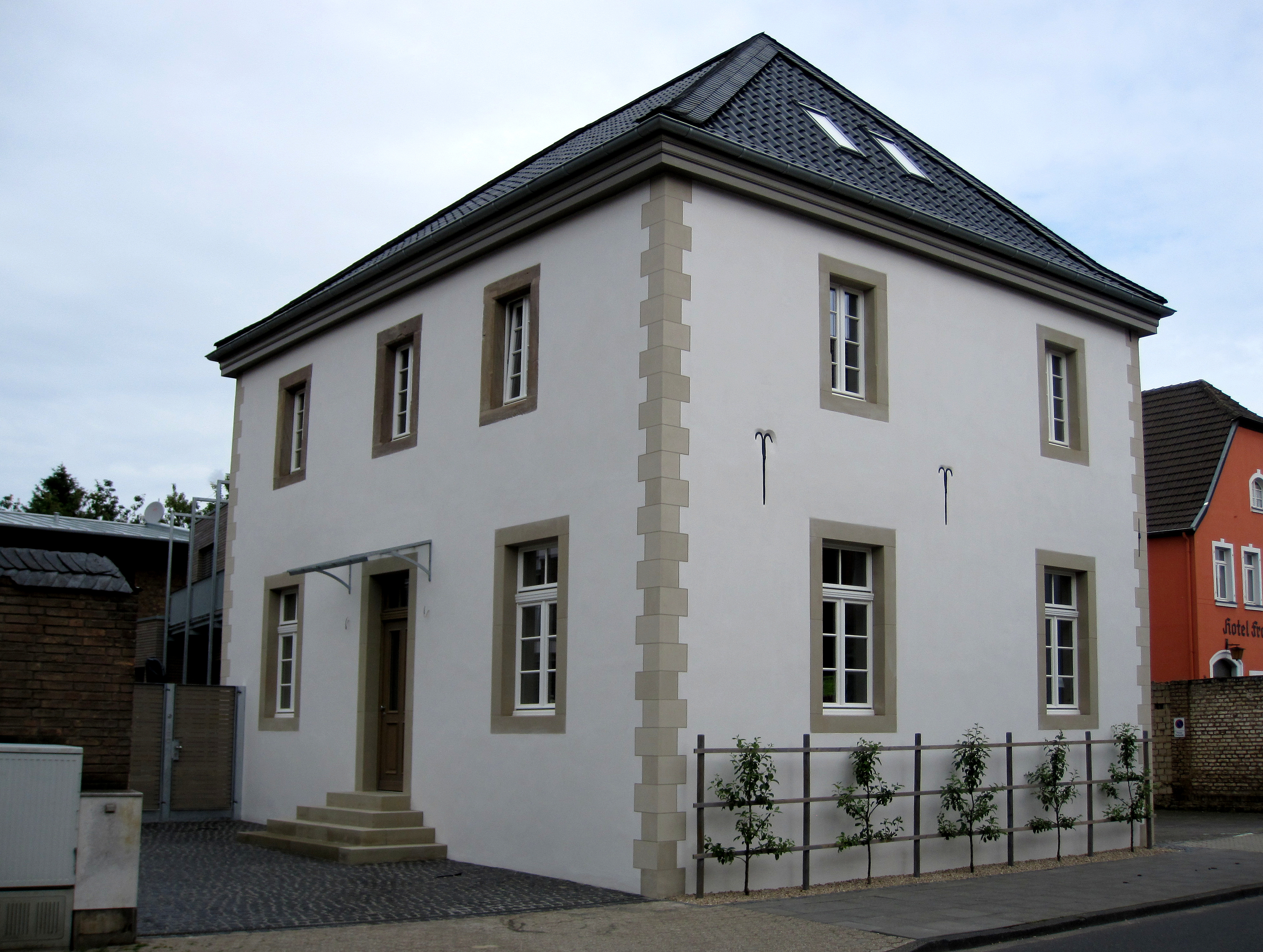 Lechenich Klosterstraße 20 II nach Restaurierung